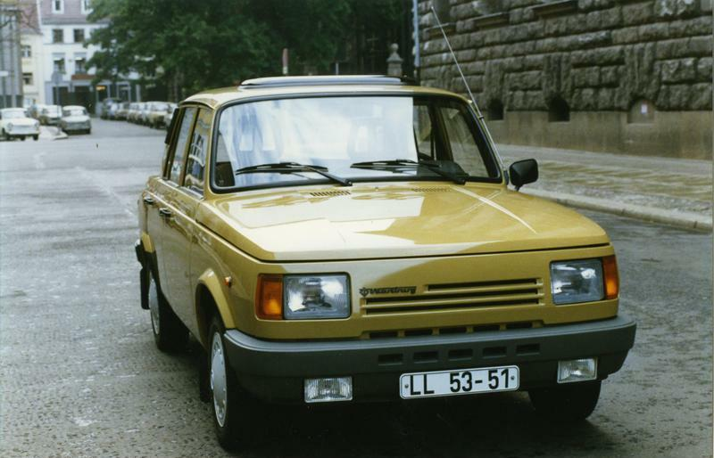 ADN-Oberst-4.4.90-Berlin: Der Wartburg 1.3 ist der jüngste Pkw-Typ aus dem VEB Automobilwerk Eisenach. Ausgestattet mit einem Vierzylinder-Viertakt-Ottomotor erreicht er eine Höchstleistung von 43 kw bei 5500 U/min. Die Höchstgeschwindigkeit ist vom Hersteller mit 135 Km/h angegeben. Der Kraftstoffverbrauch soll bei 6,8 Liter auf 100 km liegen. Der Wartburg 1.3 wird als Limousine, Tourist- und Trans-Variante produziert. (Aufnahme von 1988)